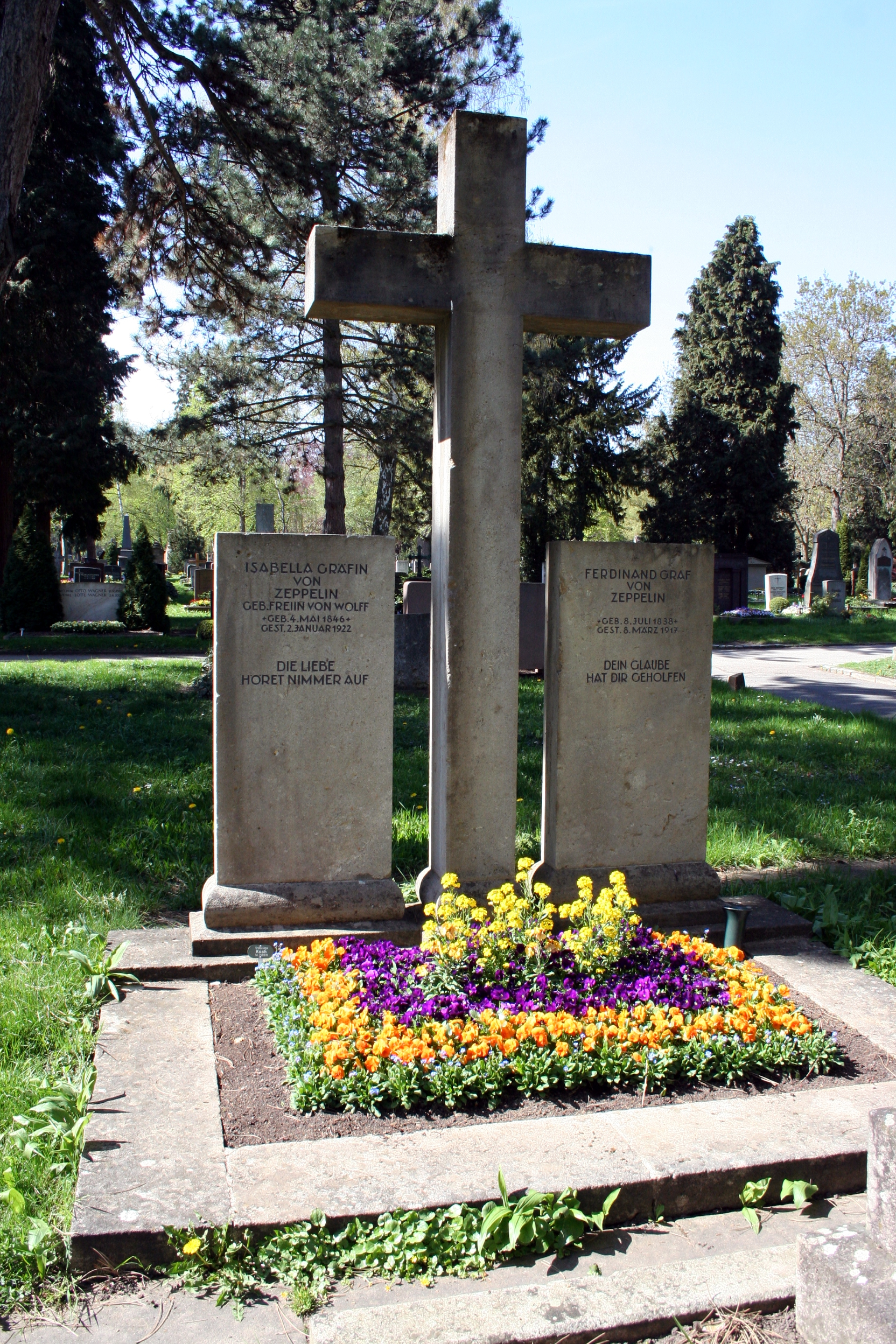 Grab von Ferdinand Graf von Zeppelin auf dem Pragfriedhof in Stuttgart